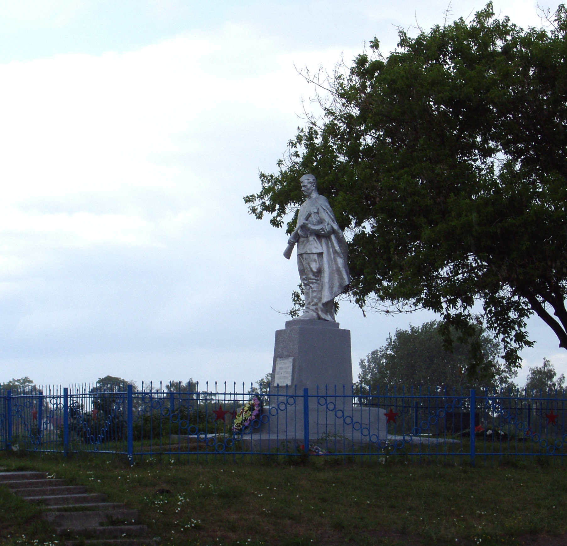 Братська могила воїнів Радянської Армії, які загинули в роки Великої Вітчизняної війни, село Іванків Бориспільського району (Київська область, Україна), вул. Центральна (біля сільської ради)